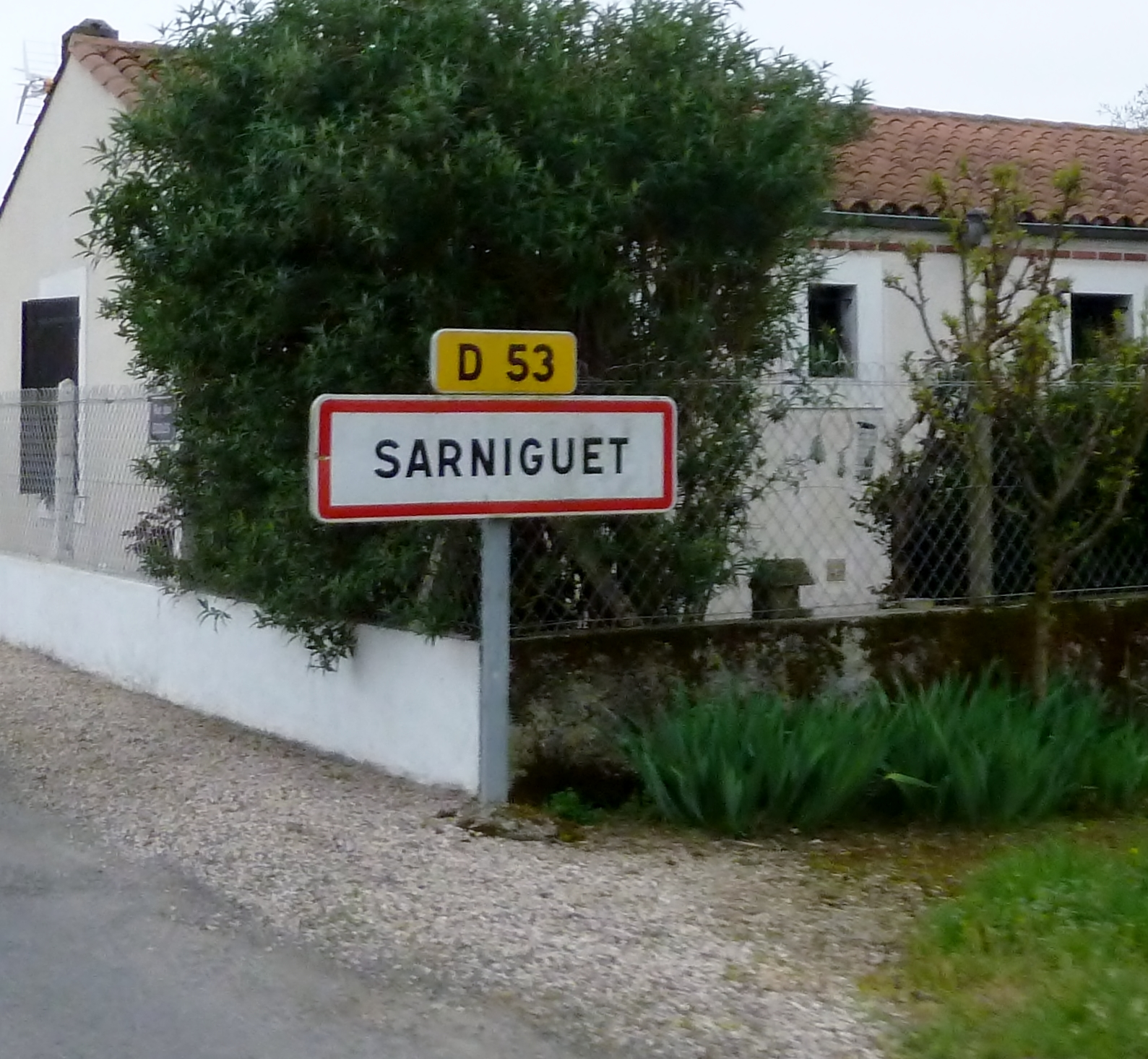 Entrée dans Sarniguet